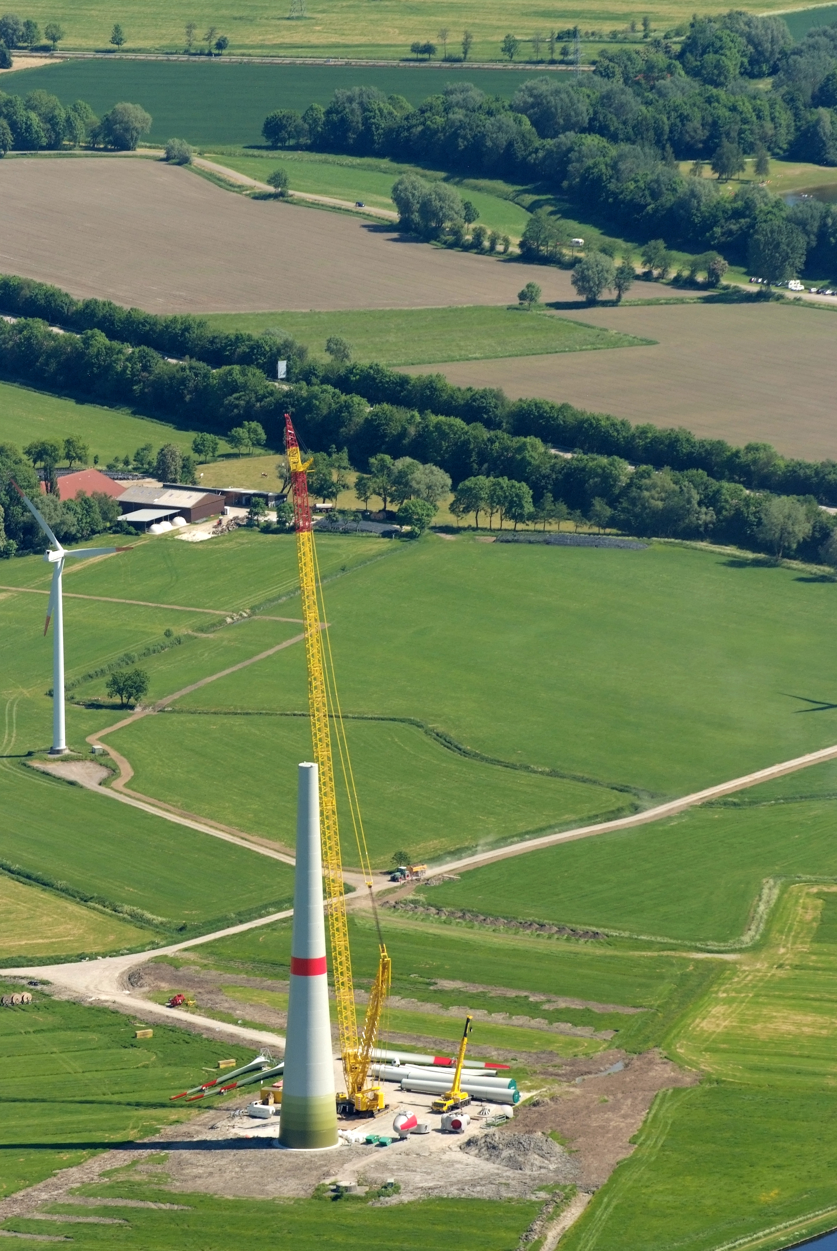 Fotoflug vom Flugplatz Nordholz-Spieka über Cuxhaven und Wilhelmshaven